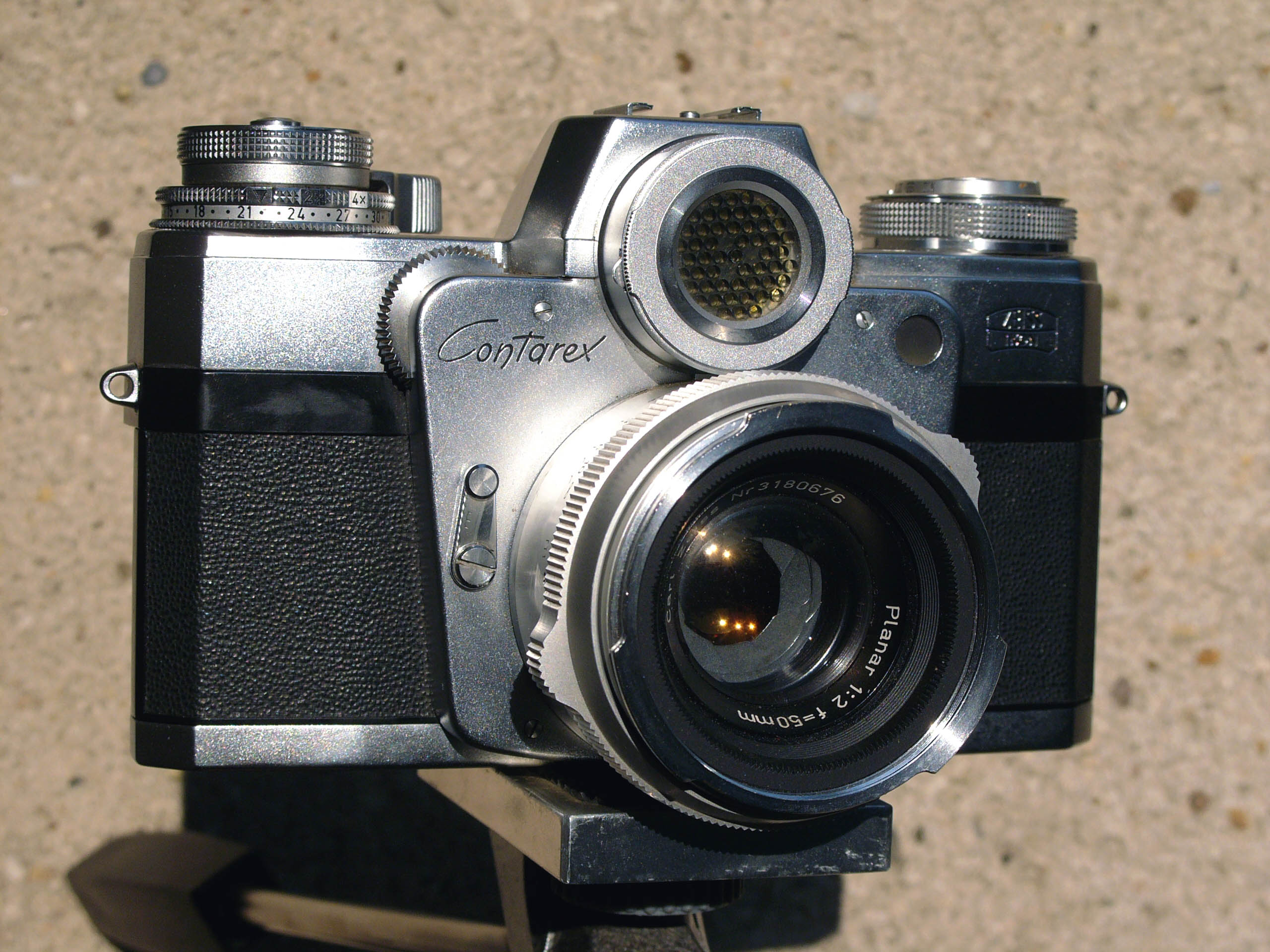 Zeiss Ikon CONTAREX with Zeiss Planar 1:2, 50 mm